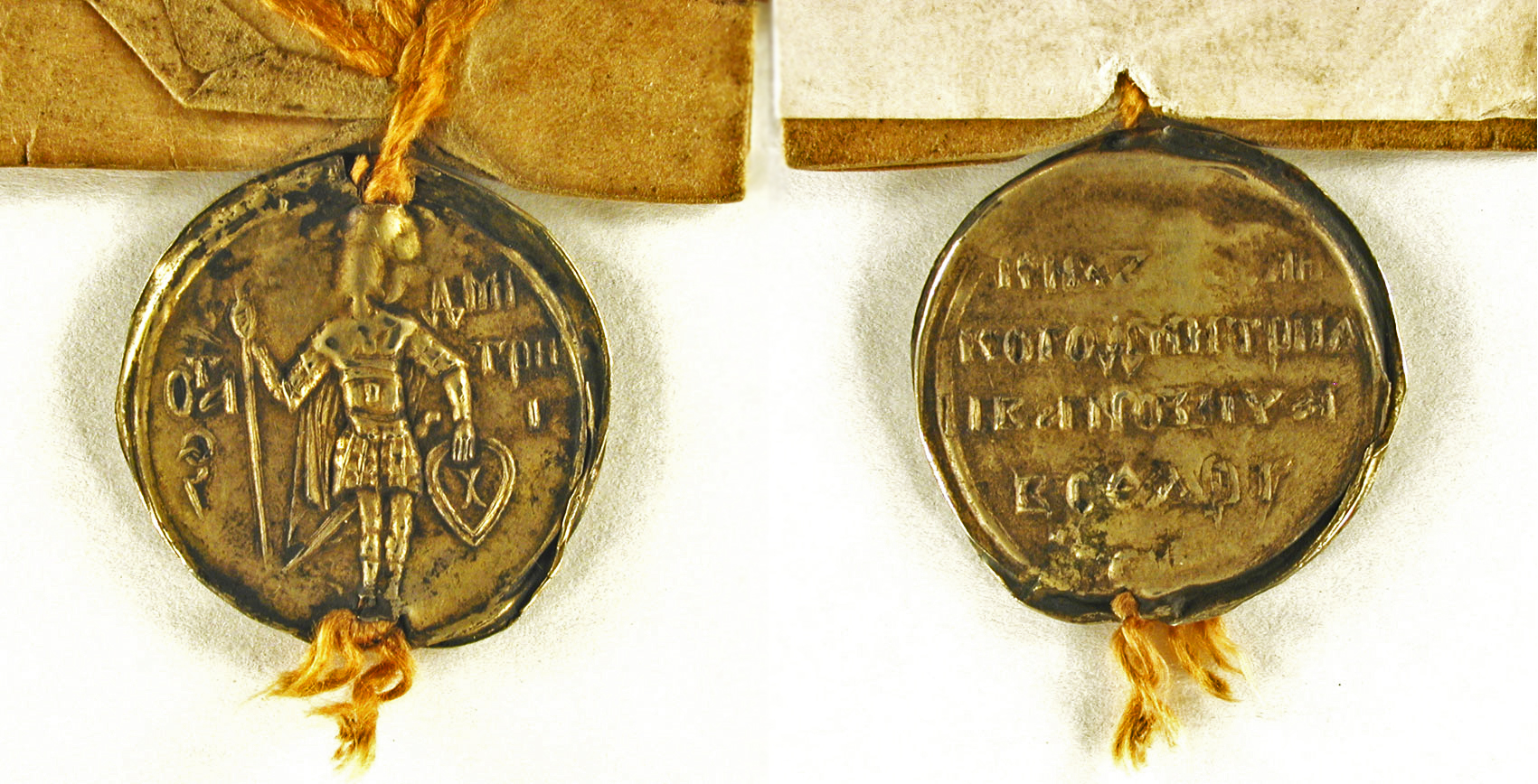 Печати на Духовной грамоте князя Дмитрия Ивановича Донского